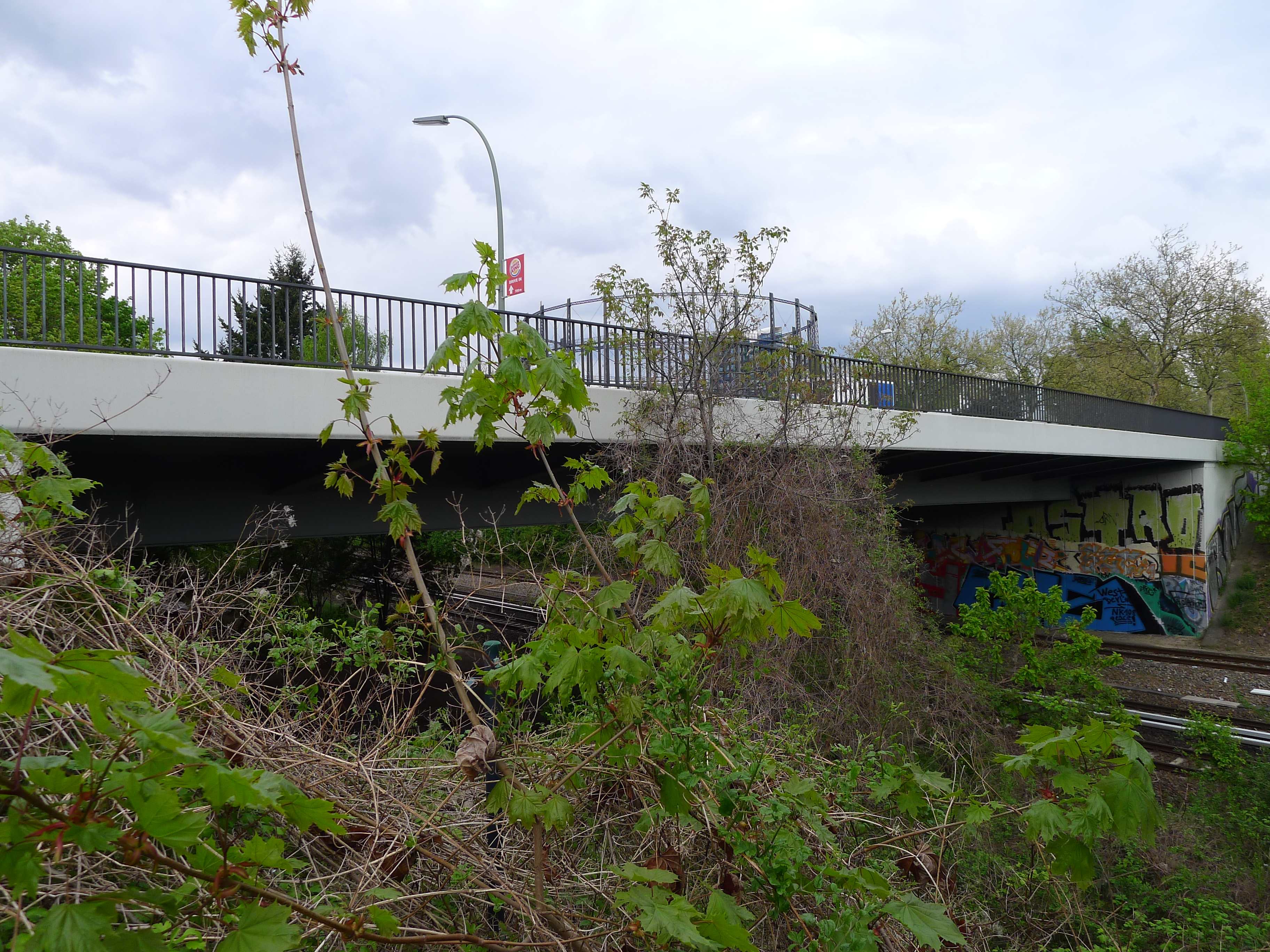 Straßenbrücke über die Bahn